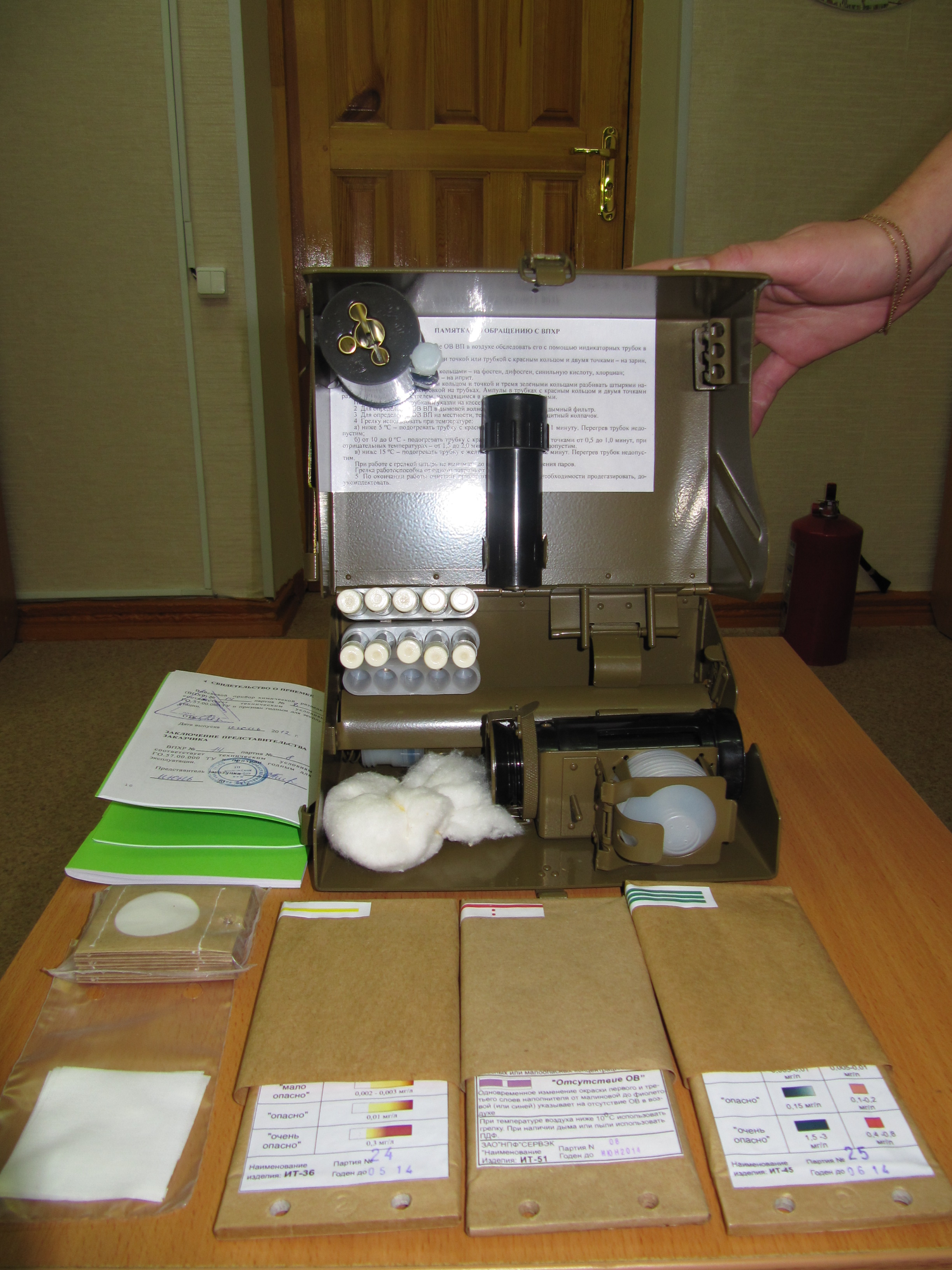 Войсковой прибор химической разведки ВПХР предназначен для обнаружения и оценки степени опасности заражения отравляющими веществами вероятного противника (ОВ ВП) воздуха, местности, военной техники при помощи индикаторных трубок (ИТ).